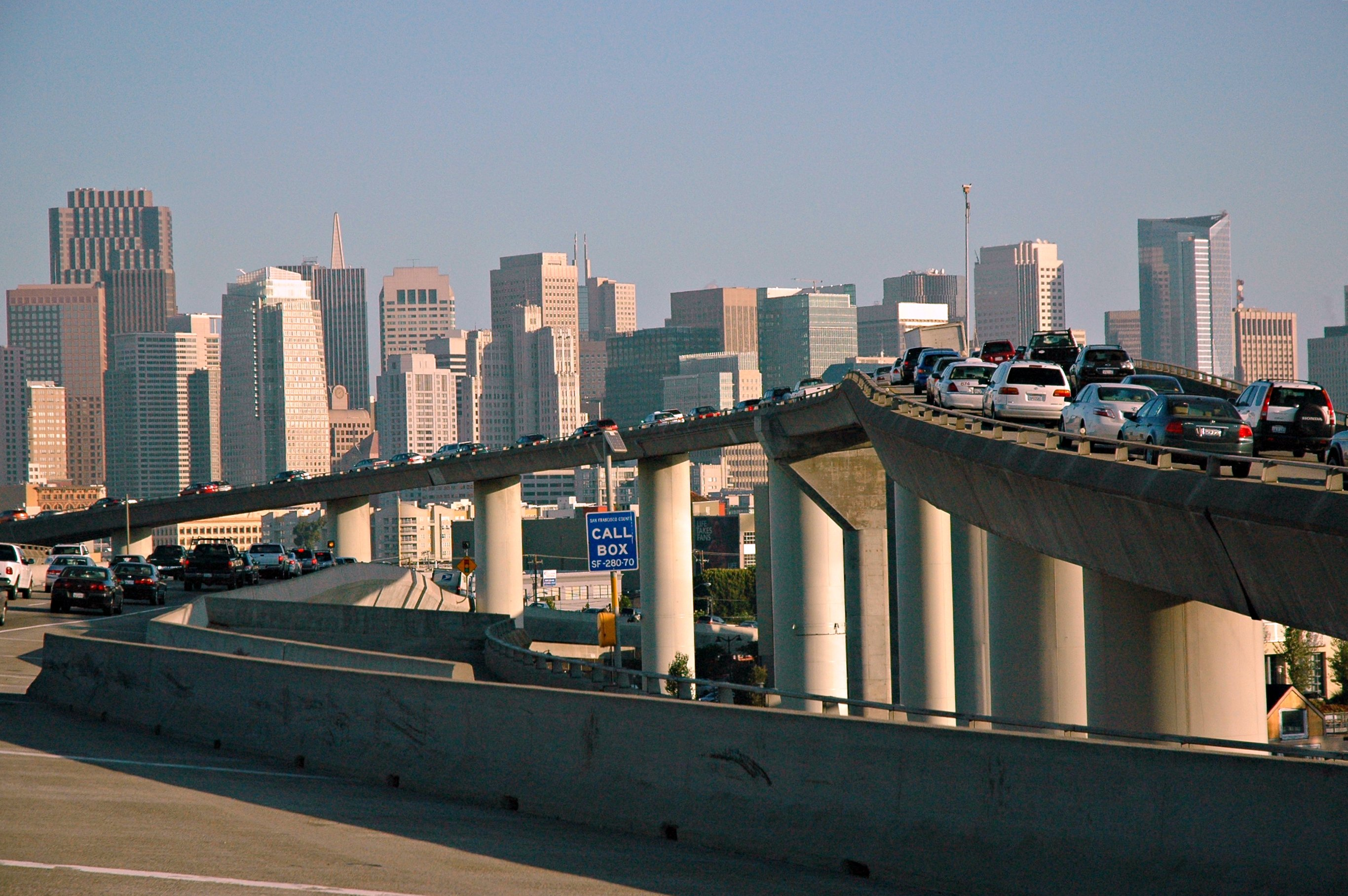 San Francisco, CA